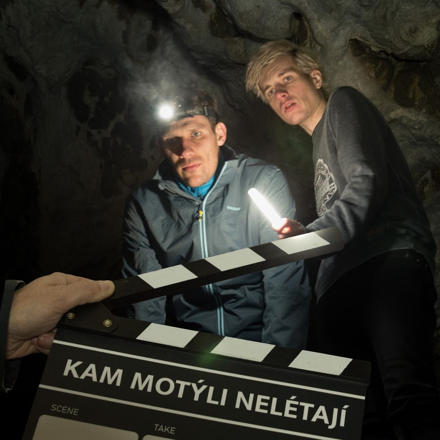 Kam motýli nelétají